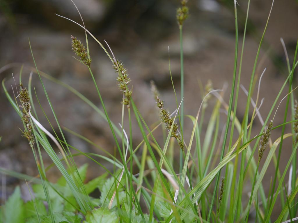 Carex albata（Carex nubigena subsp. albata）：ミノボロスゲ 2018/06/08 岐阜県中津川市・Nakatsugawa City, Gifu Pref. Japan